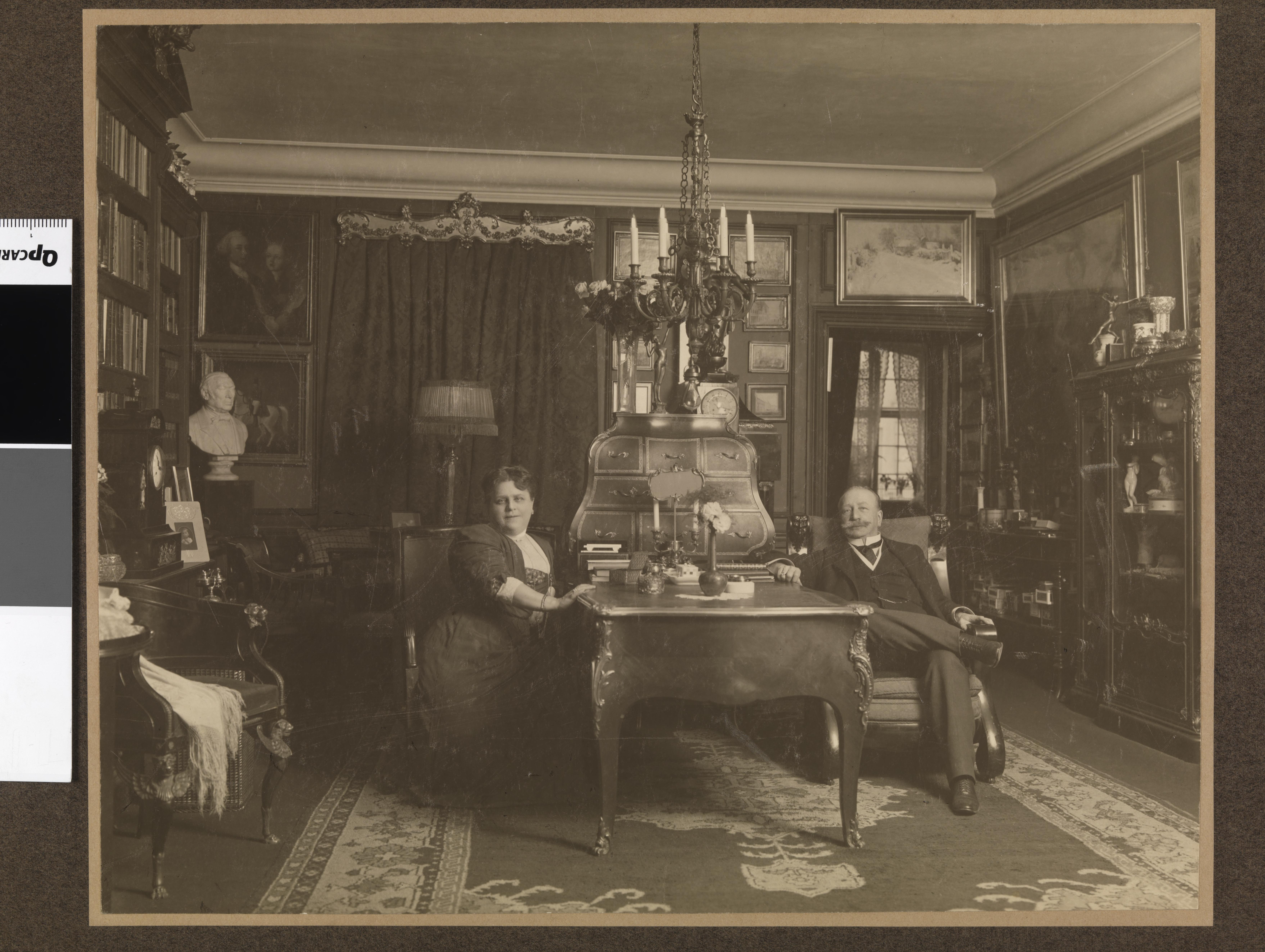 Bildet er hentet fra Nasjonalbibliotekets bildesamling Depicted person: Hegel, Jacob Deichmann Frederik Depicted person: Hegel, Julie